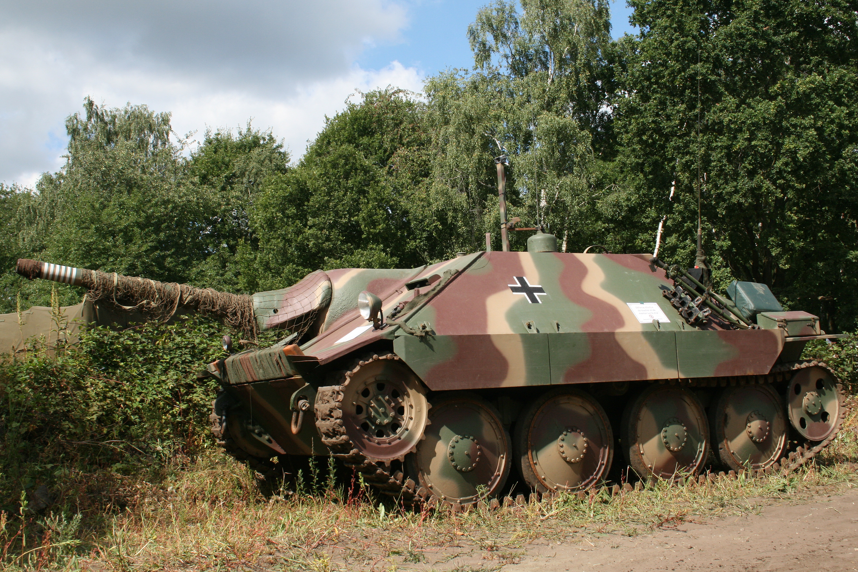 Jagdpanzer 38(t) (Sd.Kfz. 138/2) connu sous le nom de Hetzer, chasseur de char allemand de la seconde guerre mondiale.